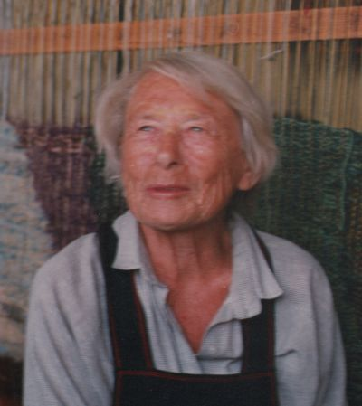 Urszula Kołaczkowska w swojej pracowni w Zakopanem